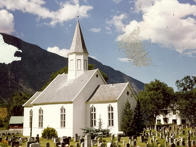 Tønjum kirke